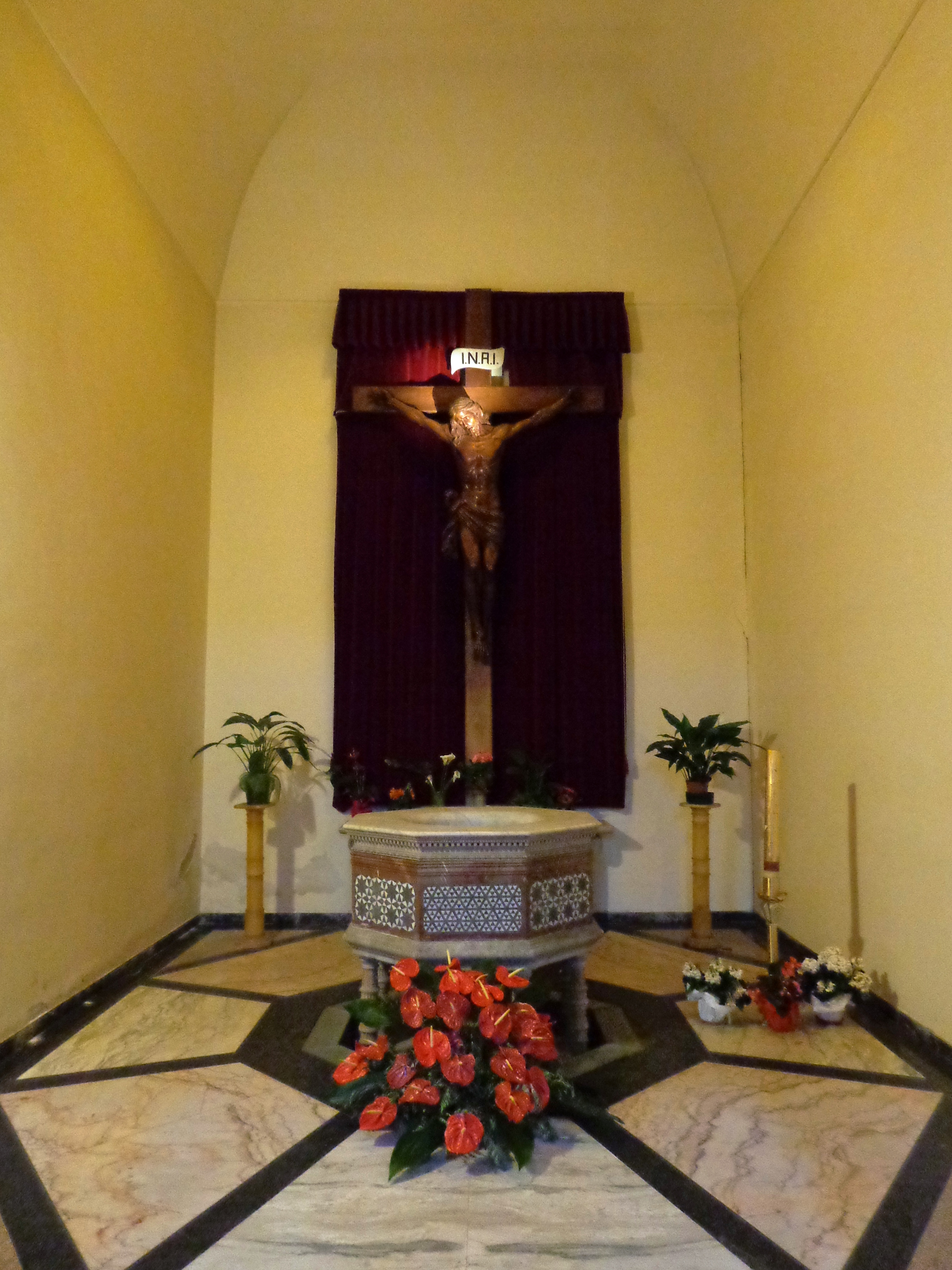 Duomo_ME_17